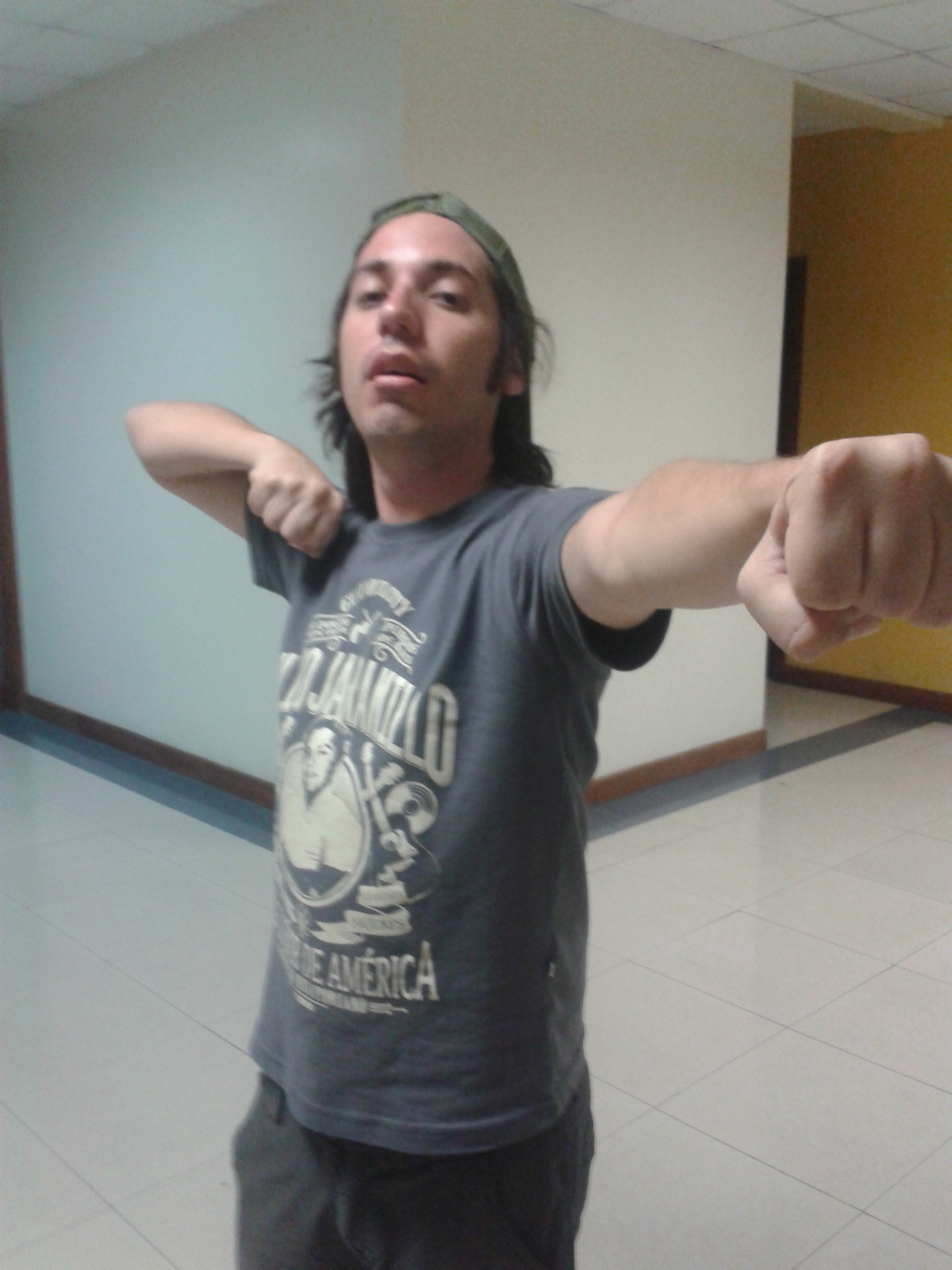 Víctor Aráuz posando como el Fusilero en los pasillos de la Universidad Salesiana de Guayaquil, el Domingo 13 de Abril de 2014.